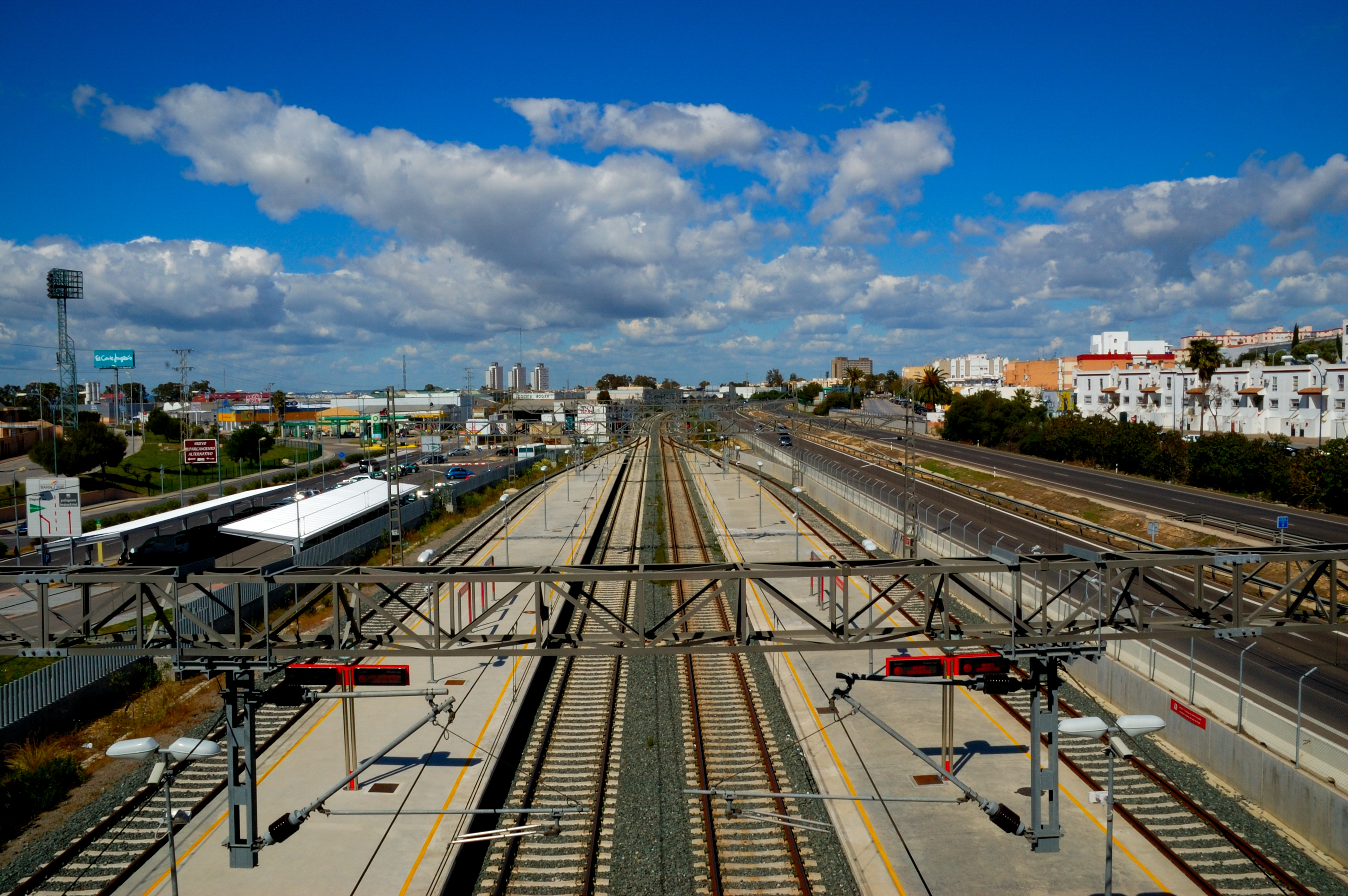 Estación de San Fernando Bahía Sur.